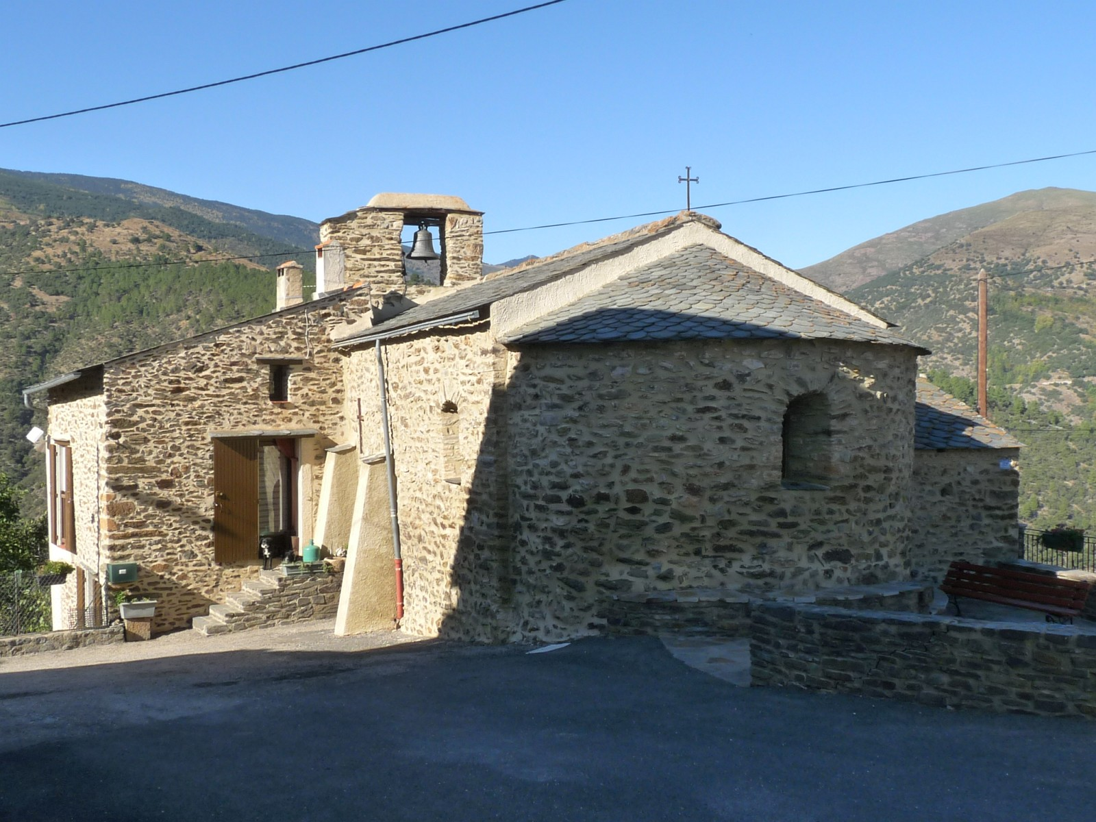 Eglise de Marians, Souanyas, Pyrénées-Orientales, France